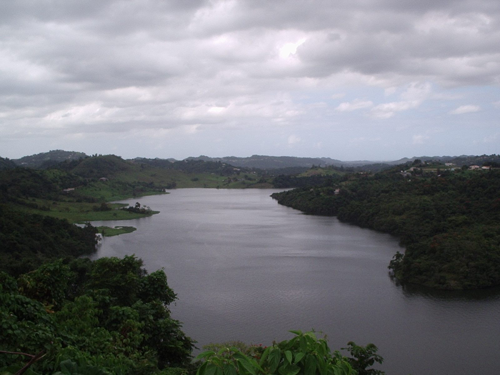 Lago La Plata, Naranjito-Toa Alta, Puerto Rico (2005)